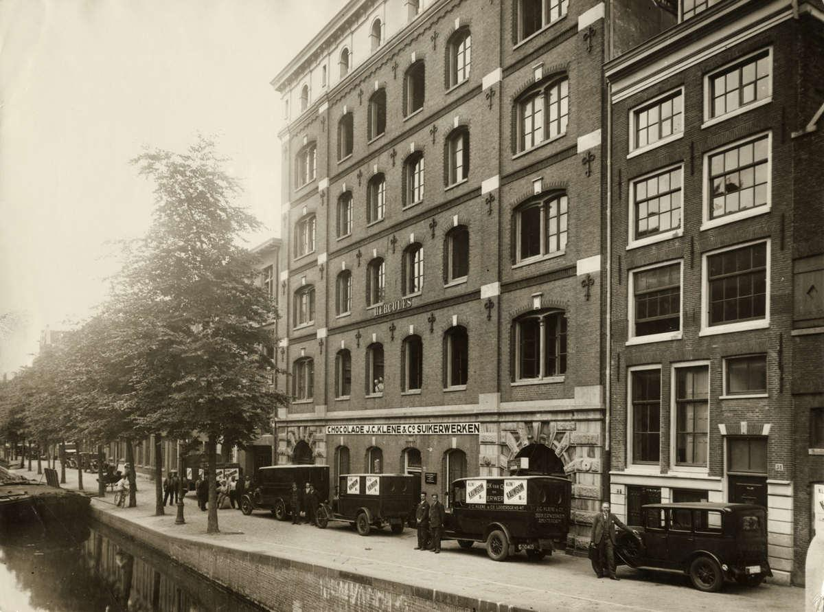 Exterieur Chocolade-en Suikerwerkenfabriek van J.C. Klene en Co., Amsterdam, Nederland, 1930. (Looiersgracht 47, gesloopt rond 2008)